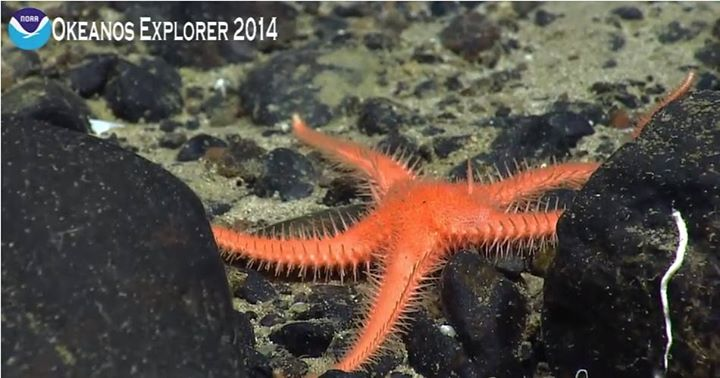 Une étoile de mer abyssale du genre Benthopecten observée à plusieurs milliers de mètres de profondeur au mont sous-marin Physalia (Mission NOAA Okeanos Explorer du 01/10/2014).